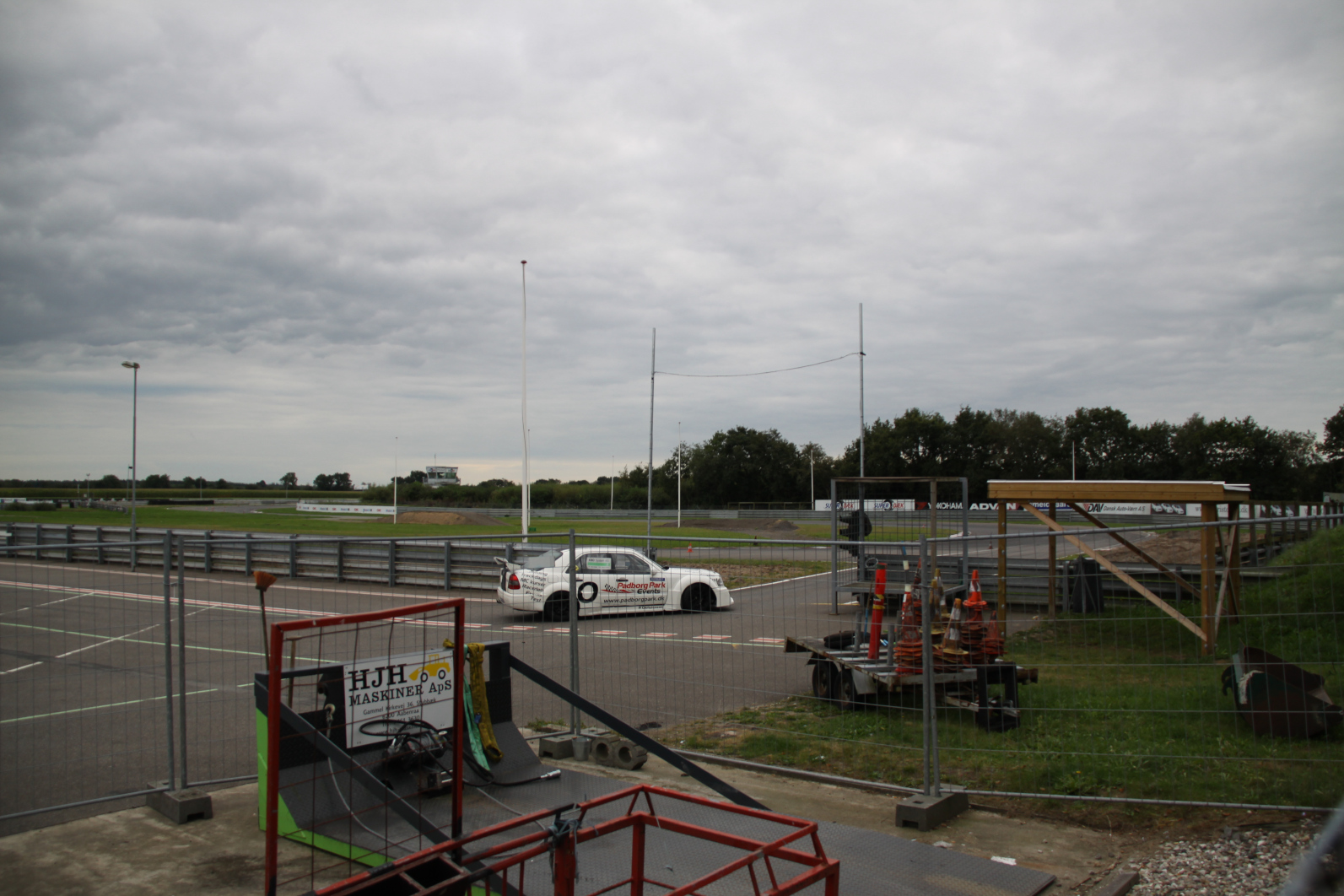 Padborg Park